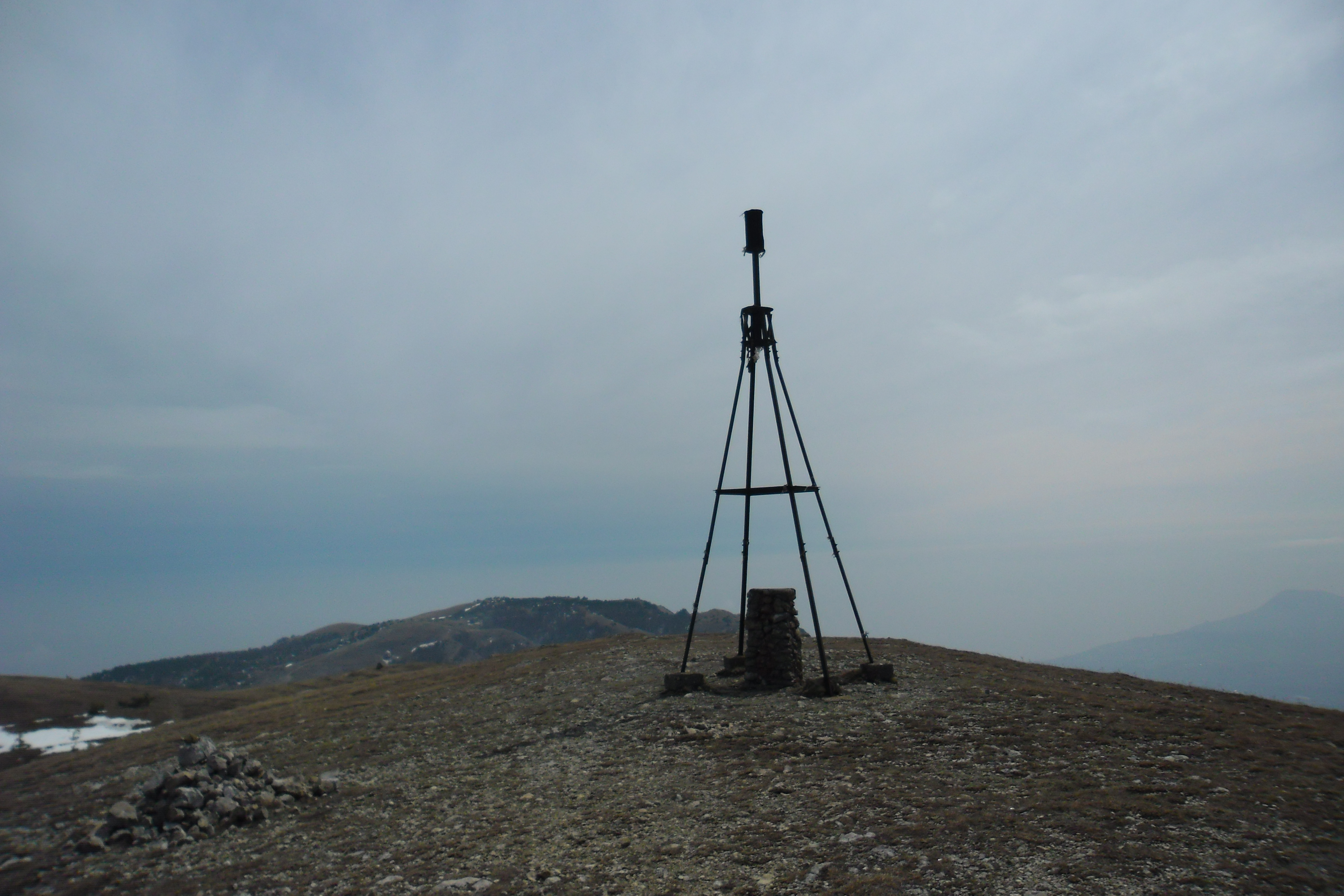 Північна_Демерджи: Фото